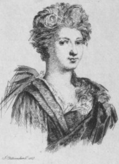 Catherine Leclerc du Rosé, dite Mademoiselle de Brie, femme d'Edme Villequin dit de Brie, est une actrice française née en 1630 et morte vers 1706. Elle appartient à la troupe de Molière dès 1650, puis entre à la Comédie-Française lors de la formation de cette troupe en 1680.